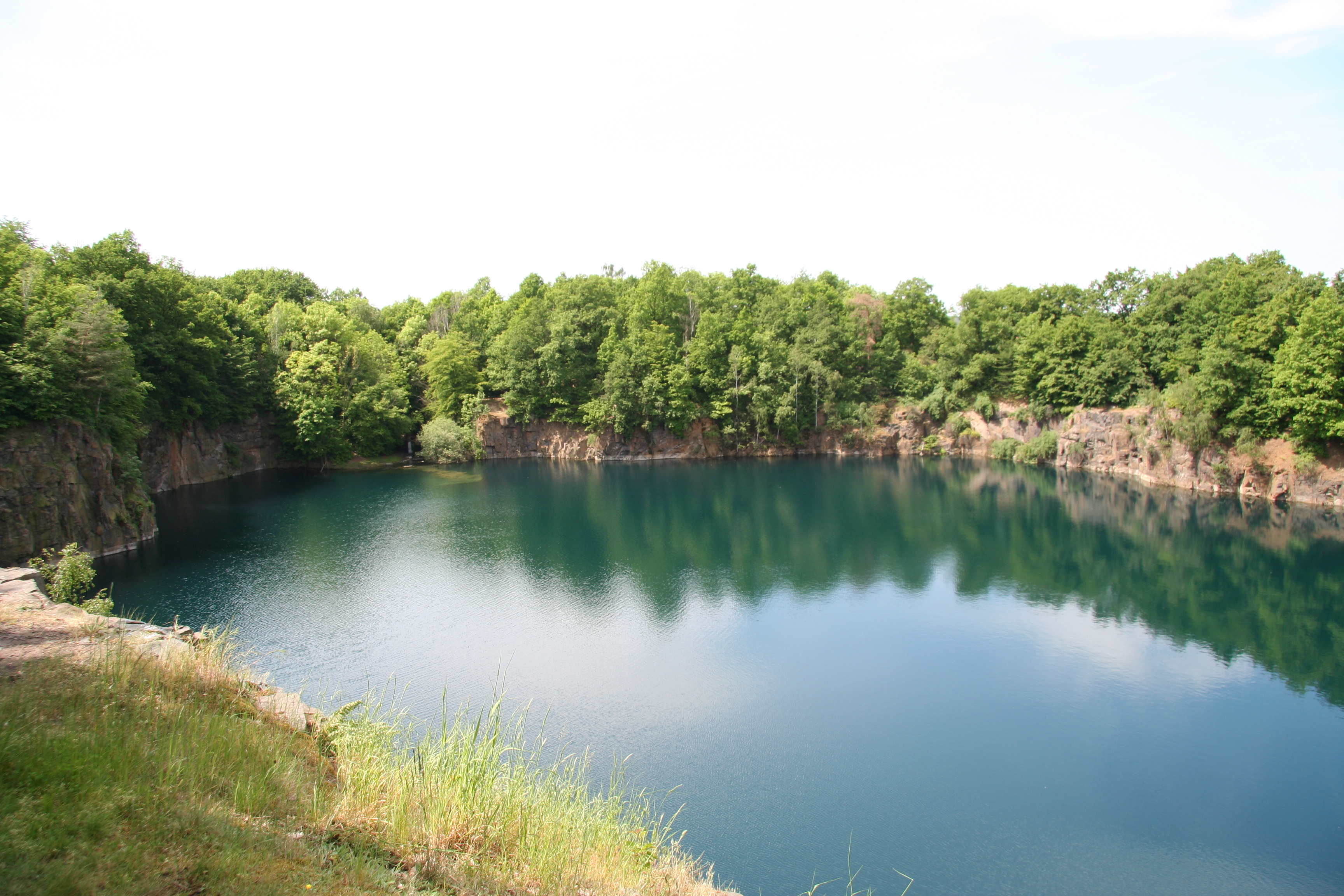 Im Naturschutzgebiet "Haselberg-Straßenteich", Landkreis Leipzig, WDPA-ID: 163540